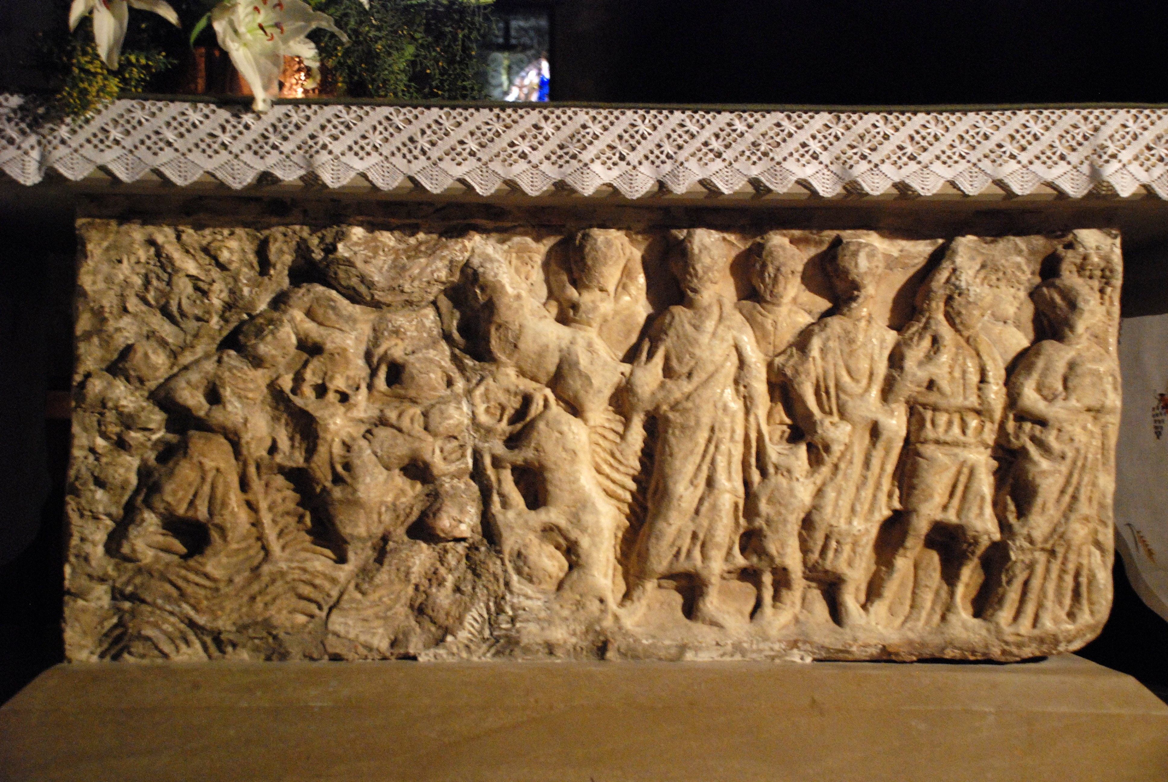 Moustiers-Sainte-Marie - Autel